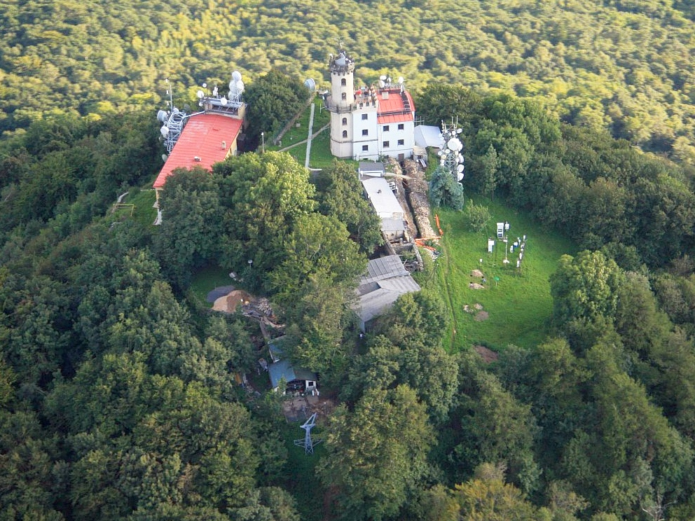 Velemín, Czech Republic